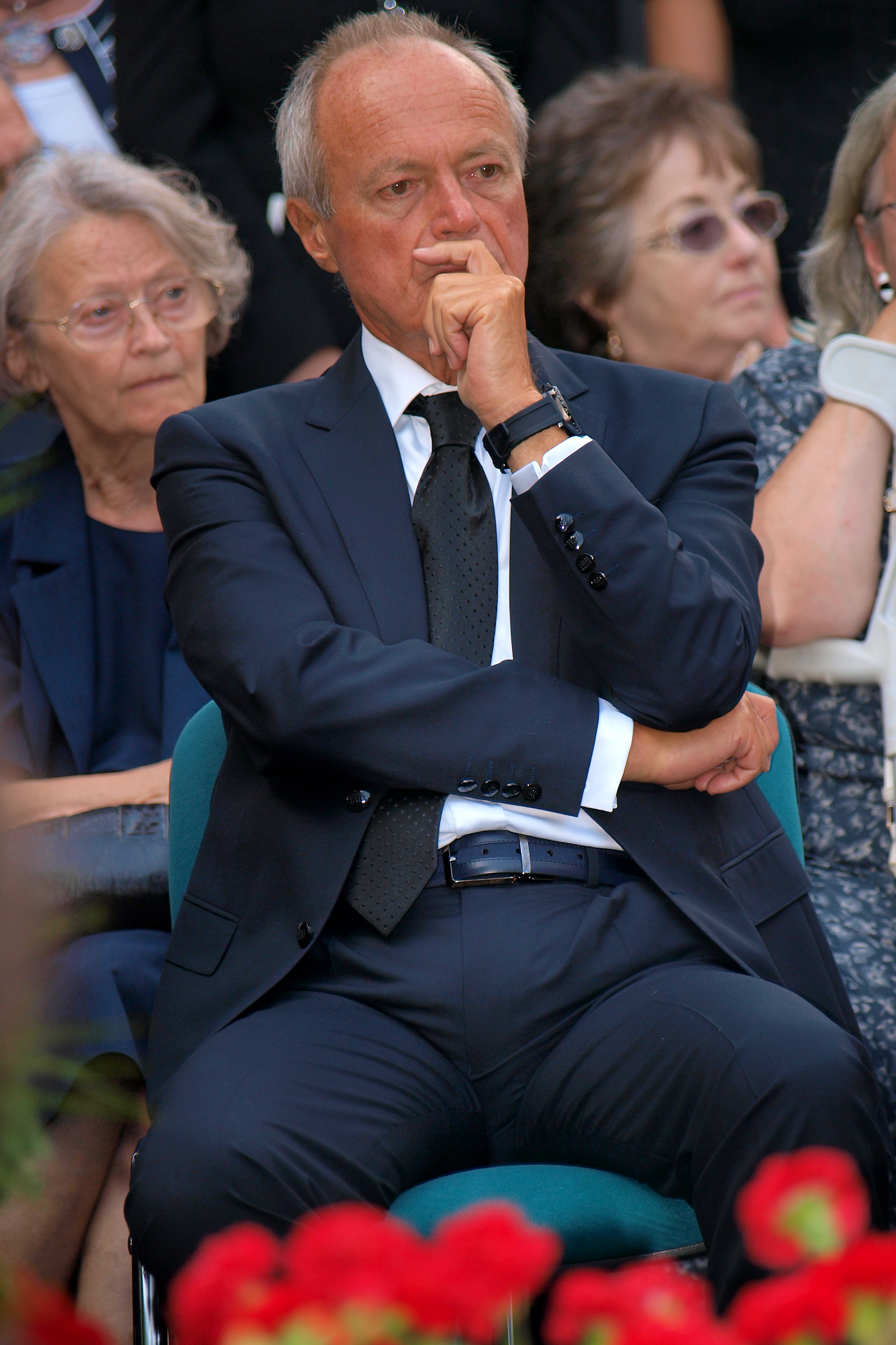 Medgyessy Péter egykori kormányfő Kiss Péter temetésén (2014-08-15)